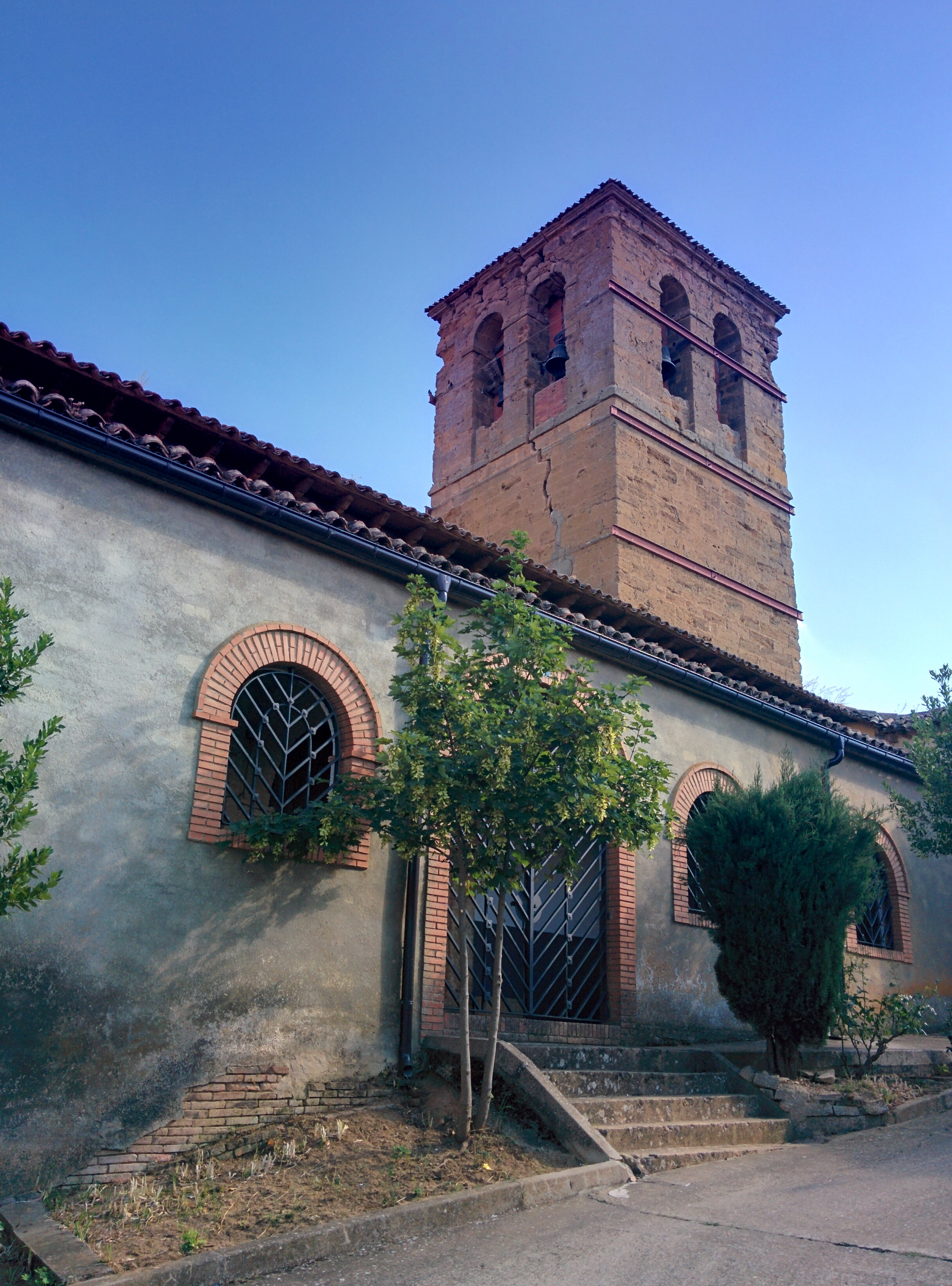 Iglesia de San Clemente, en Escobar de Campos (León, España).